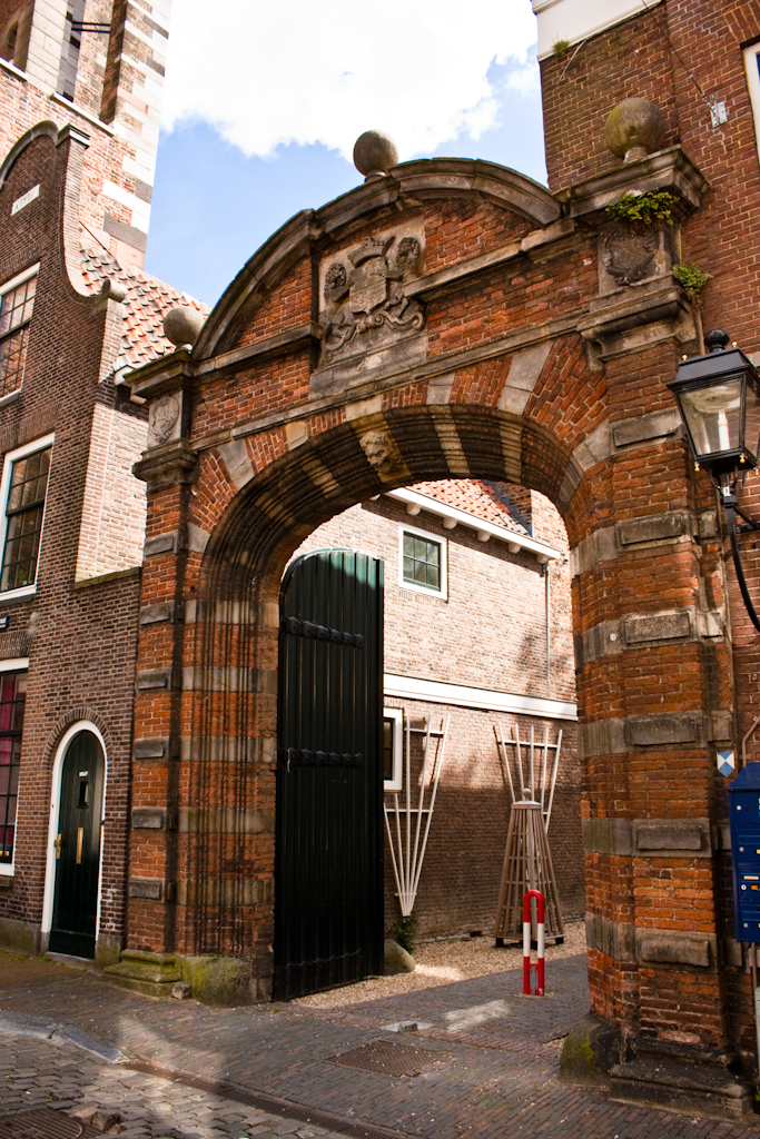 Poort van het Bisschopshof aan de Servetstraat (1634) Gate of the Bisschopshof Servetstraat (1634)